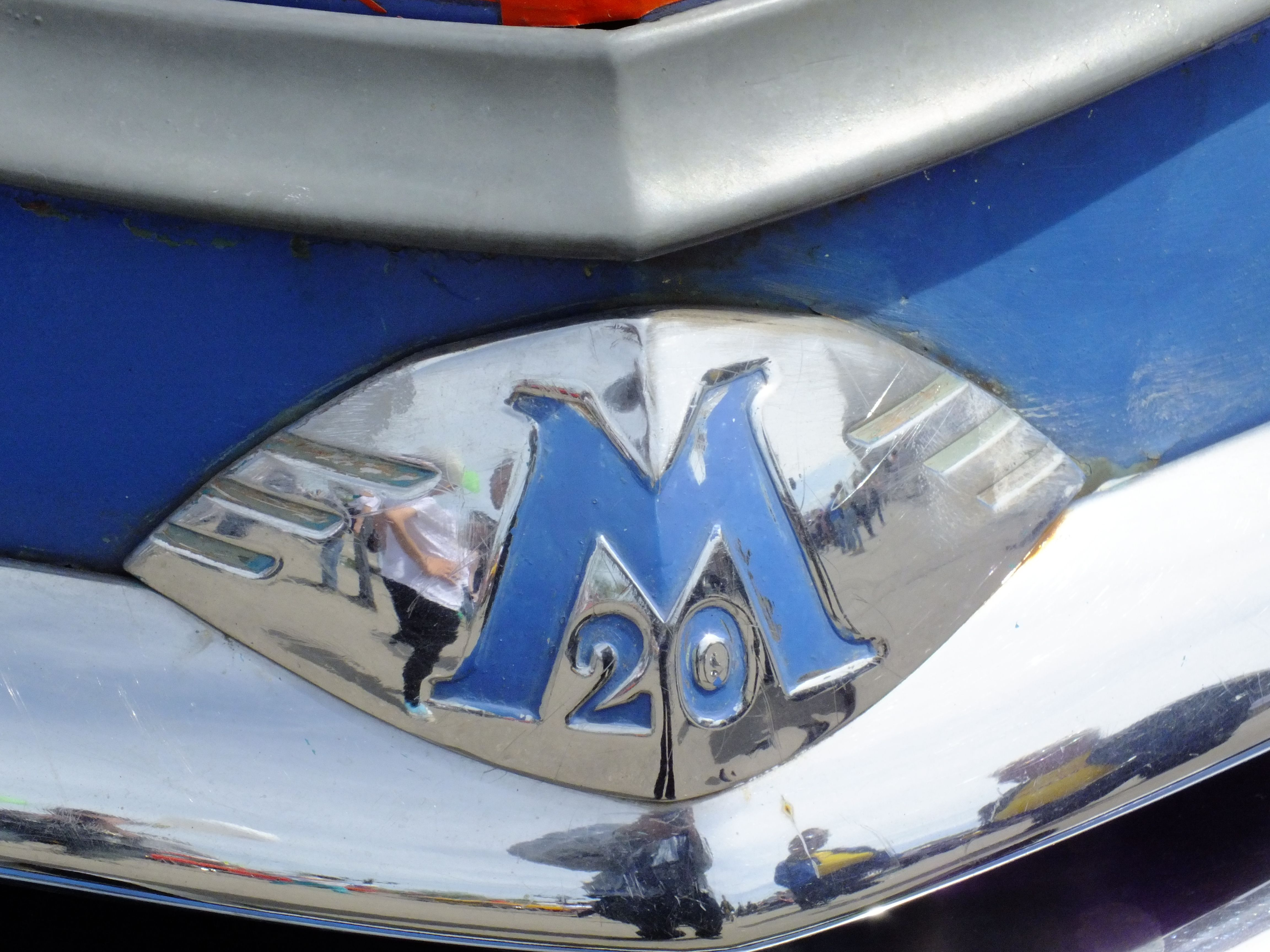 GAZ-M20 Pobeda